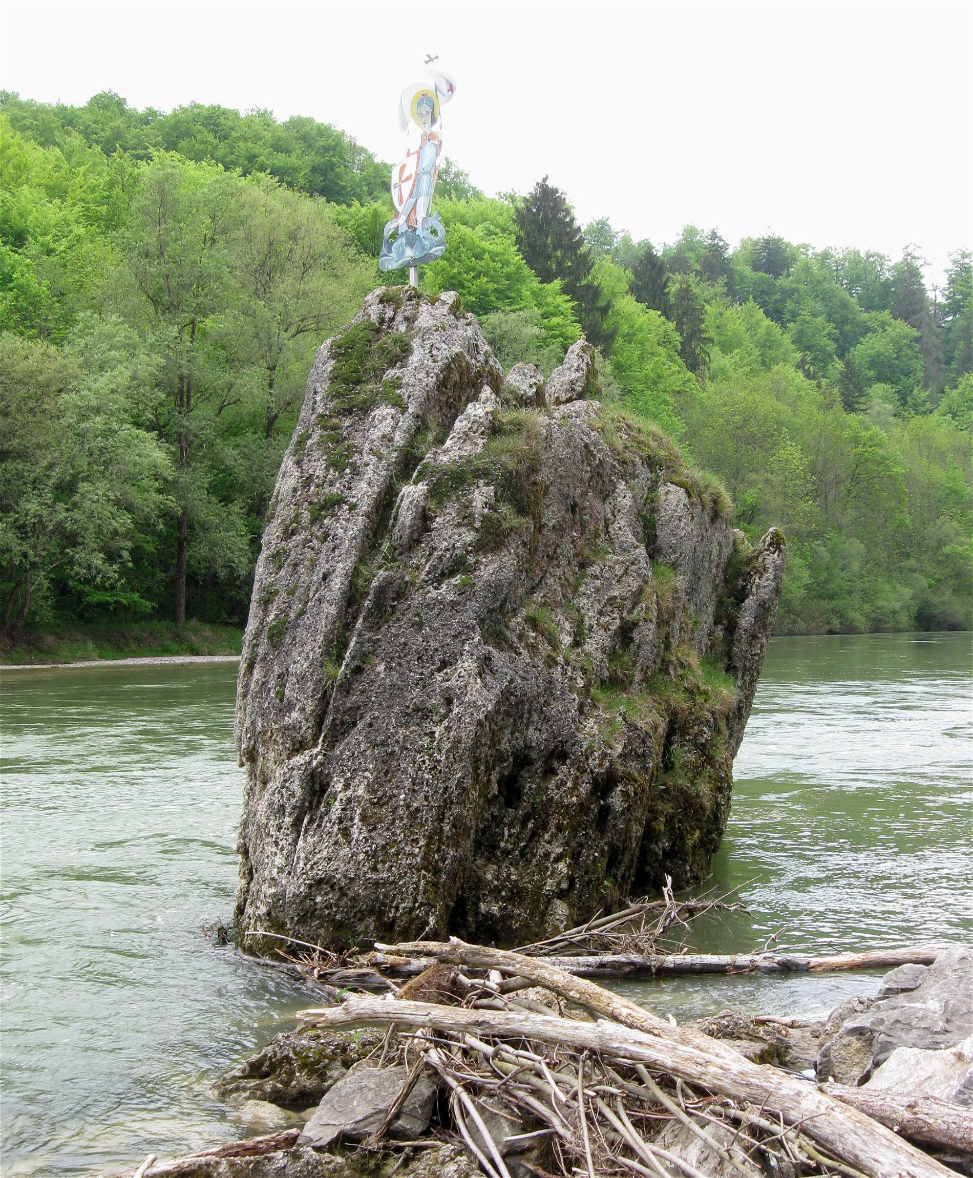 Georgenstein in der Isar bei Baierbrunn, vom Ostufer aus fotografiert